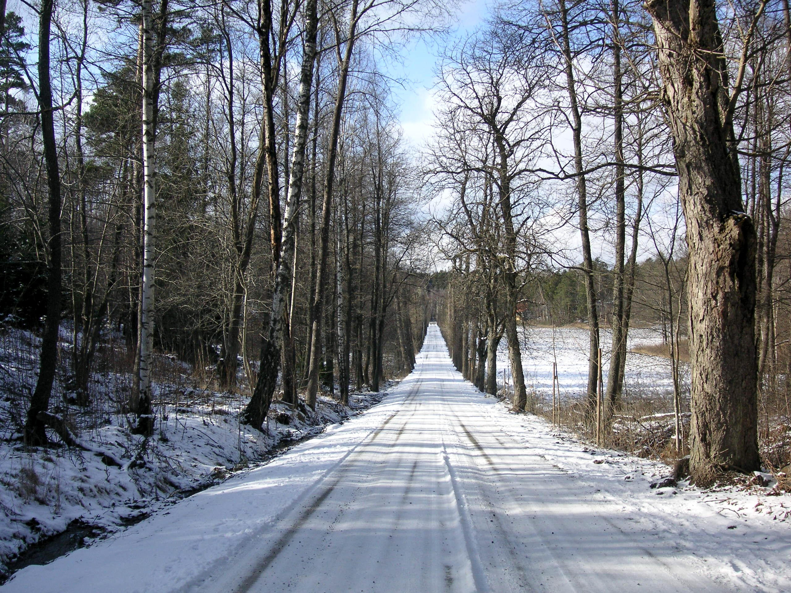 Balingsta allé till Balingsta gård i Huddinge